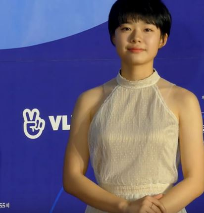 5월 1일 오후 서울시 강남구 삼성동 코엑스에서 제 55회 백상예술대상 시상식 레드카펫 행사가 열렸다.